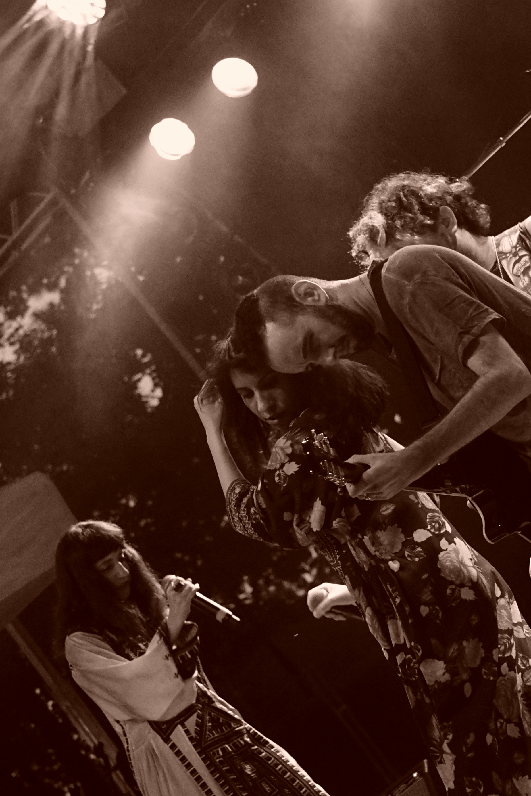 en concert lors de " Musiques d'ici et d'ailleurs", à chalons en 2016.